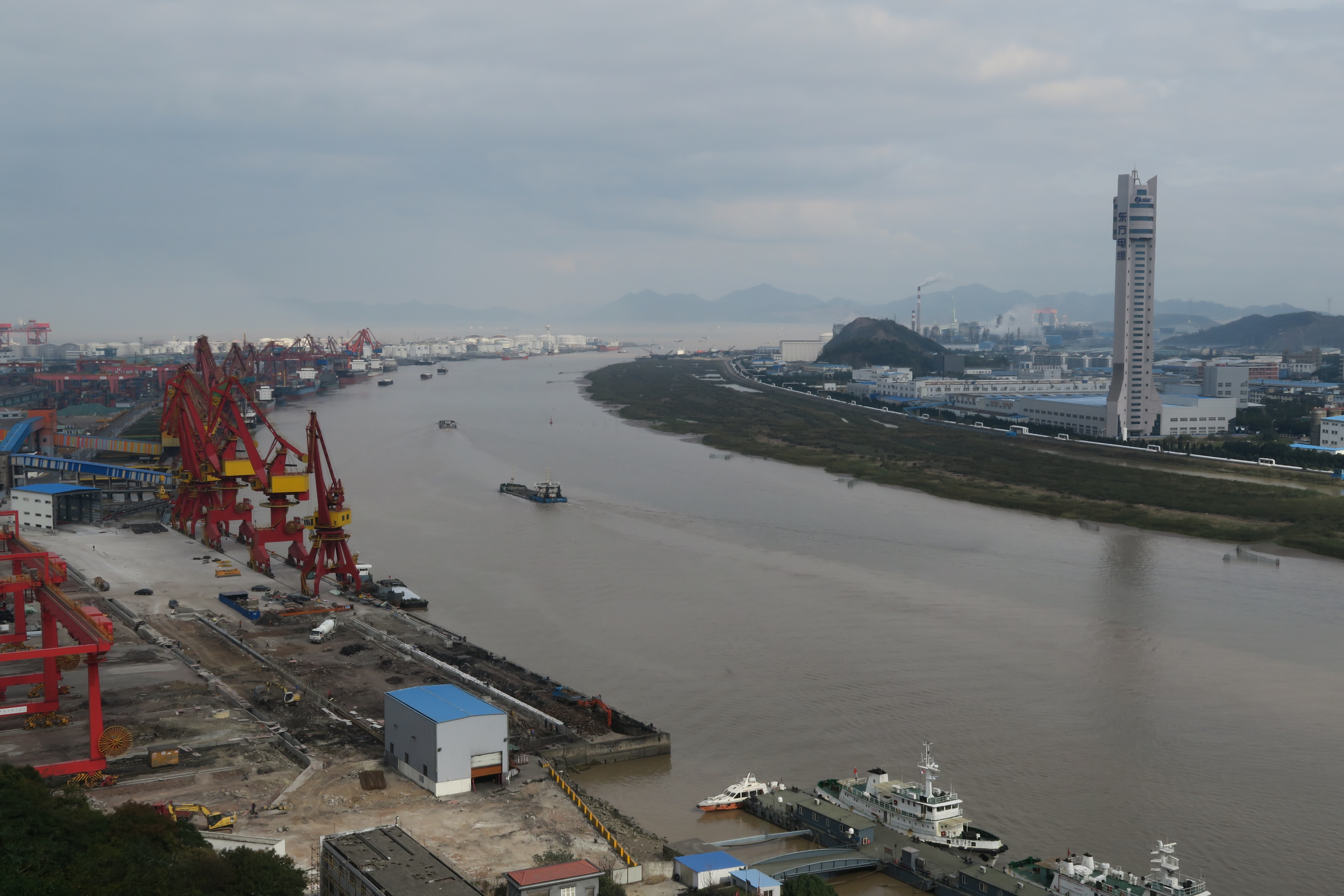 宁波甬江口